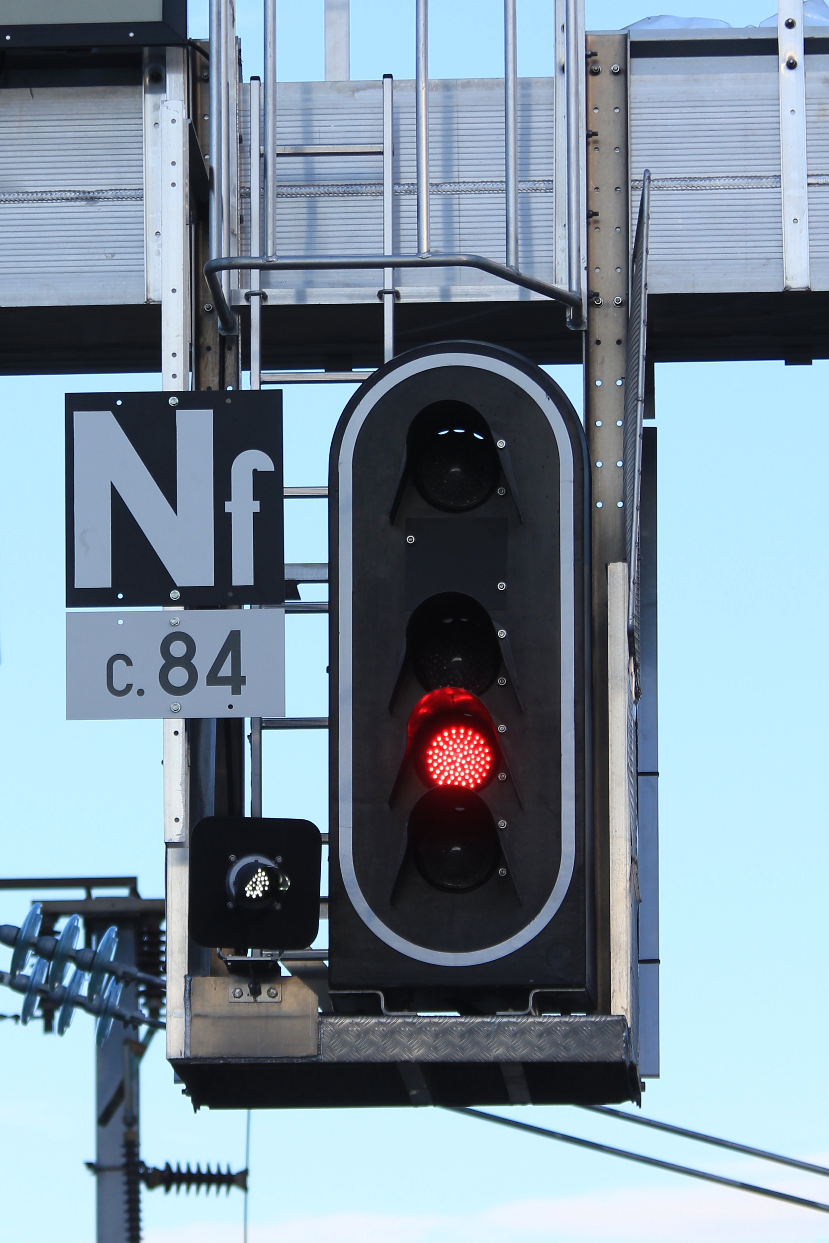 Signal Nf de BAL présentant le sémaphore (1 feu rouge + oeilleton blanc) à la gare de Nanterre Université, côté SNCF (ligne L).